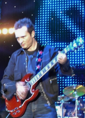 Jim Corr